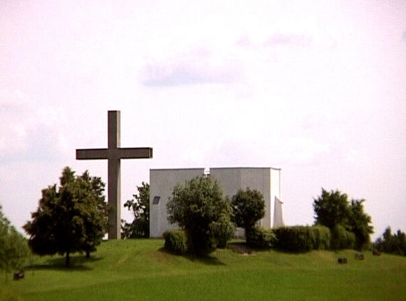 Kapelle auf dem Schlösslberg im Naturpark Raab